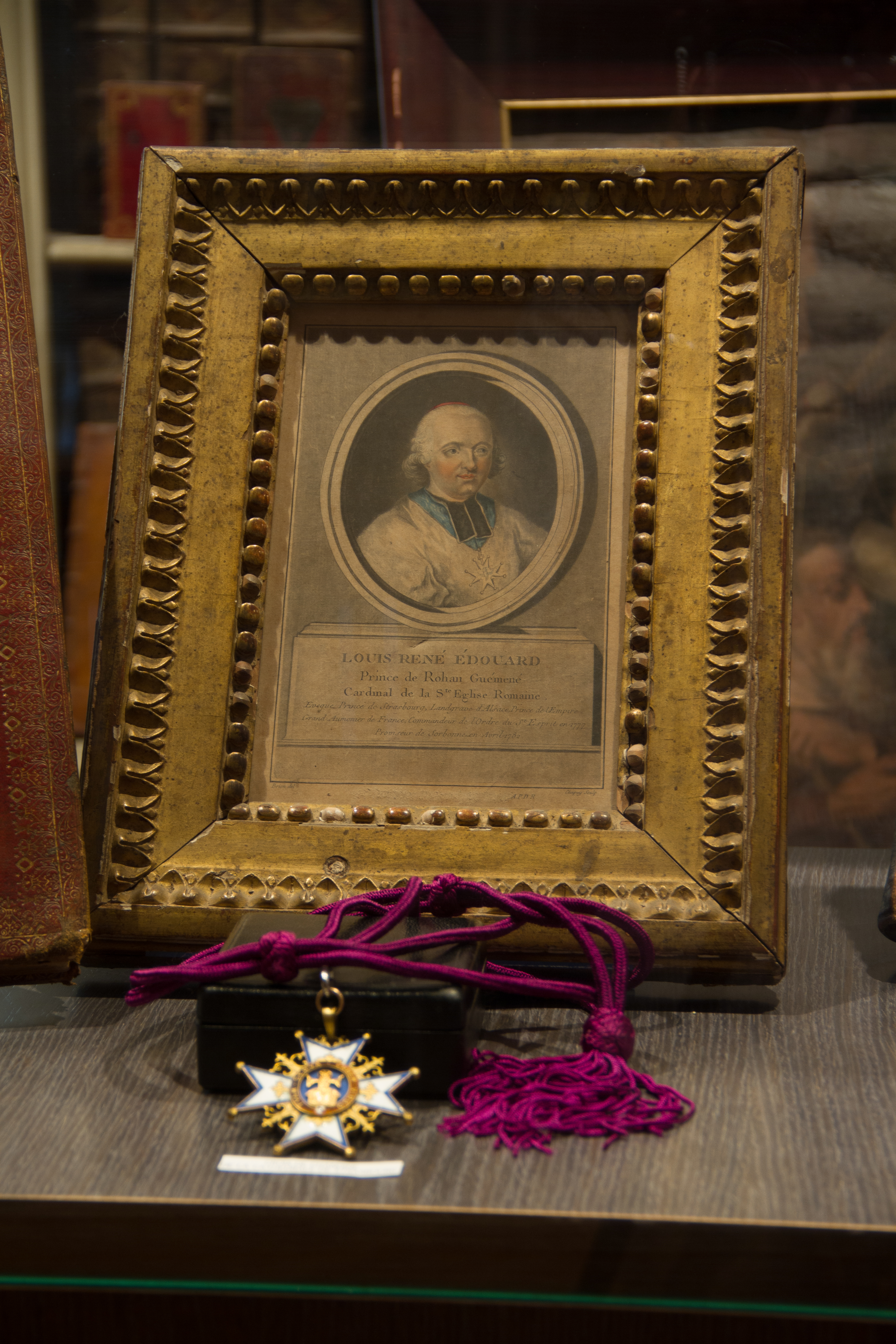 Portrait de Louis René Édouard, prince de Rohan. Bibliothèque du Grand Séminaire de Strasbourg. Conservateur : Louis Schlaefli.